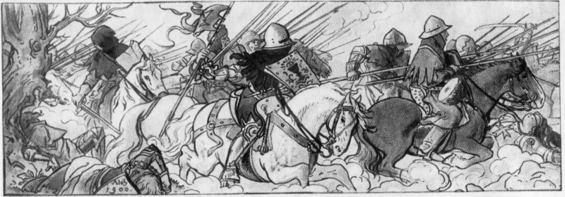 Útok husitské jízdy